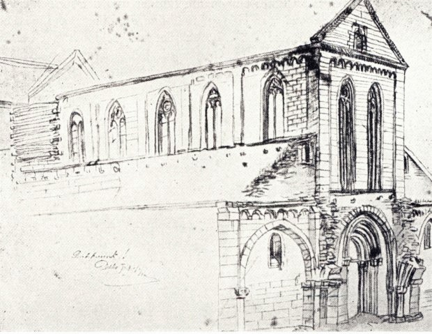 Frankenthal Erkenbertruine (Kloster Groß-Frankenthal), Bauzustand um 1800, Zeichnung von Johannes Ruland (1744-1830)